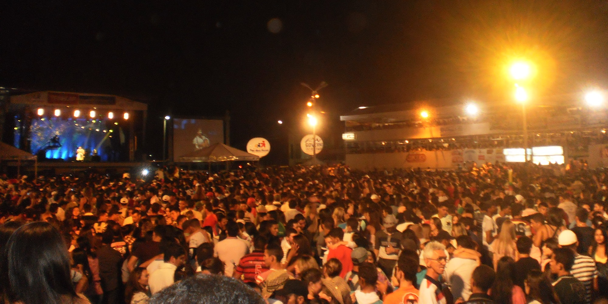 Show de Paula Fernandes em 4 de setembro de 2011, último dia da Feira Intermunicipal de Educação Cultura Turismo e Negócios do Alto Oeste Potiguar (FINECAP), em comemoração aos 155 anos de Pau dos Ferros, Rio Grande do Norte (Brasil).